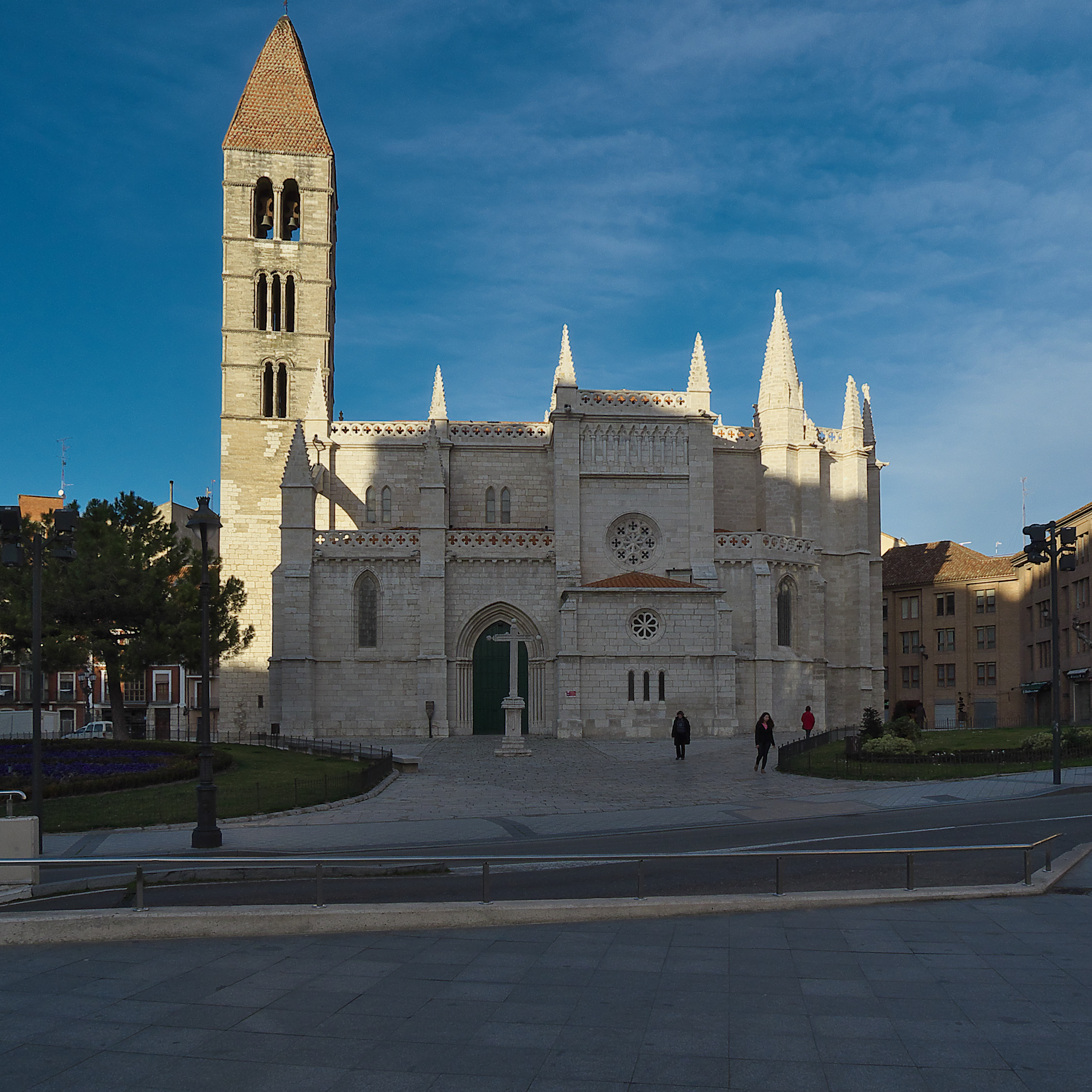 Sus orígenes se remontan al siglo XI. A causa de la cimentación, la historia constructiva de la iglesia ha sido de continuas reformas y reedificaciones. Rodrigo Gil de Hontañón, Diego de Riaño o Vicente Lampérez y Romea entre otros, y principalmente Adolfo Fernández Casanova (1917-1930) han intervenido.